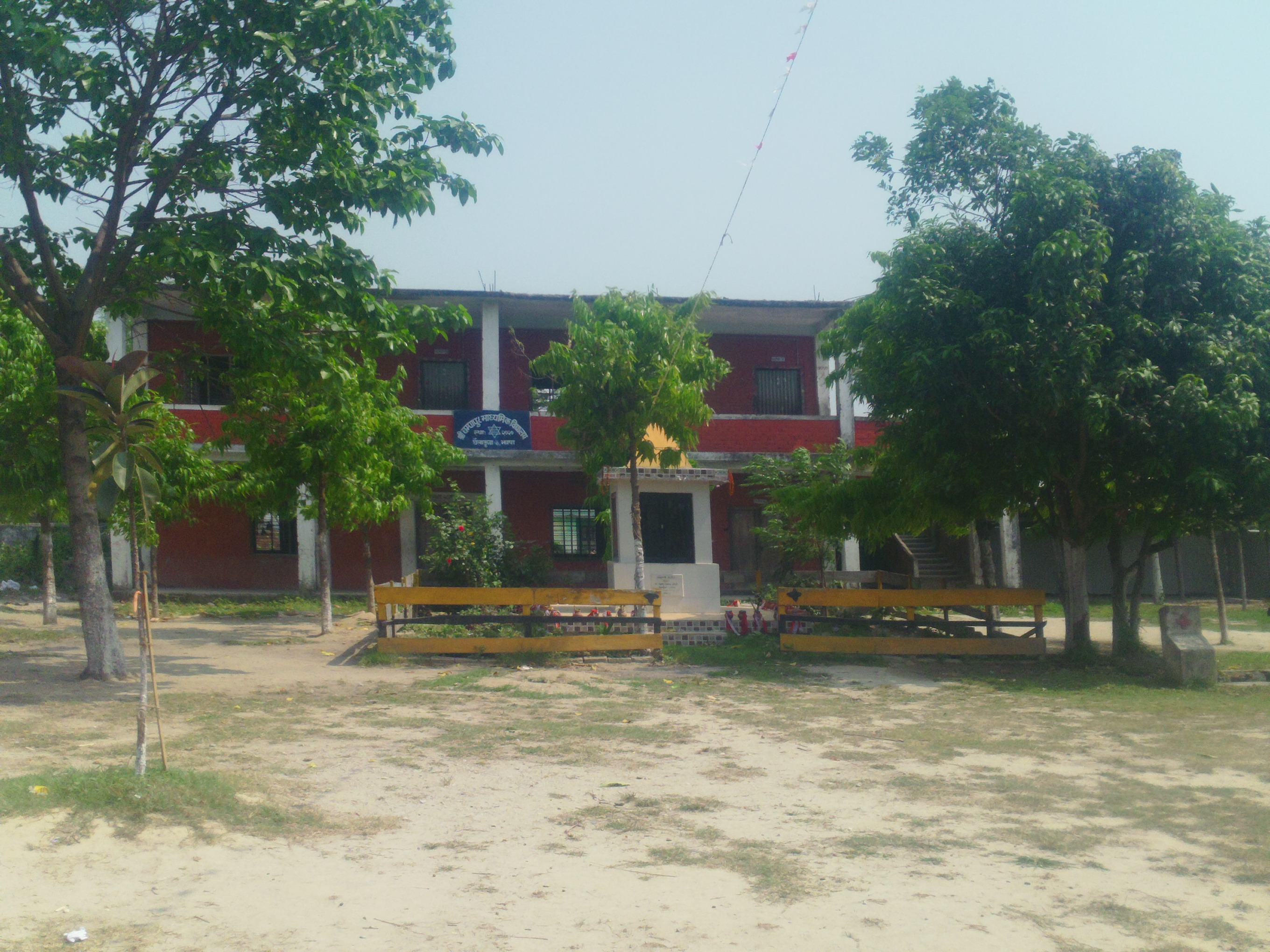 नेपाली: स्कुल भवन